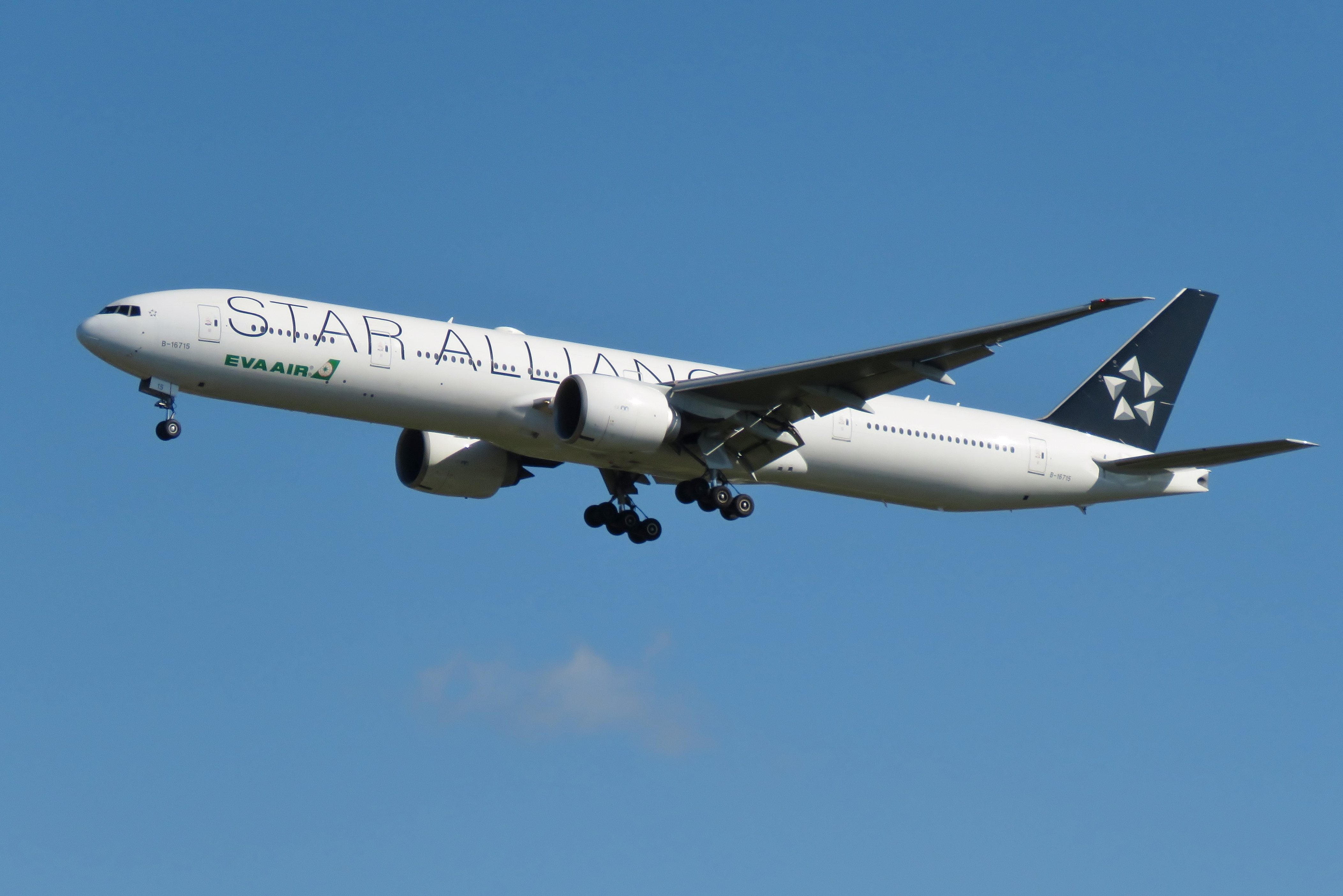 長榮航空 波音777-300ER (航空器註冊編號:B-16715) 星空聯盟彩繪於台灣桃園國際機場